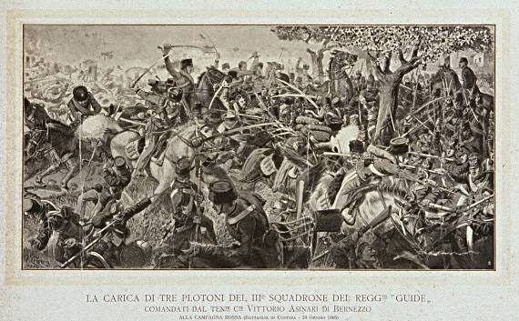 Carica del 3º Squadrone Guide comandato da Vittorio Asinari di Bernezzo, nel corso della Battaglia di Custoza, il 24 giugno 1866